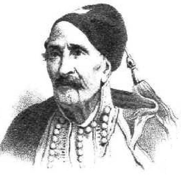 Griechischer Freiheitskämpfer, 19. Jahrhundert